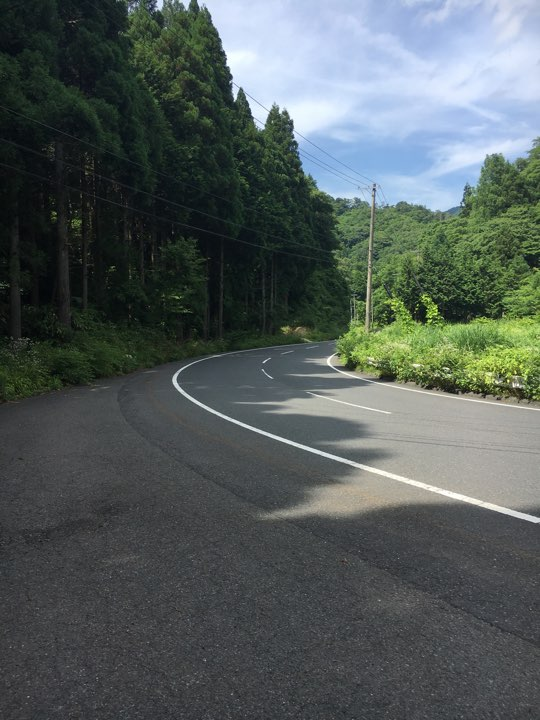 2017年7月2日撮影